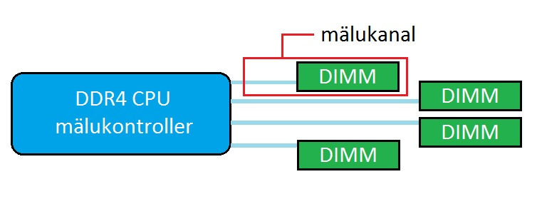 DDR4 puhul on iga kanal ühendatud vaid ühe mälumooduliga.